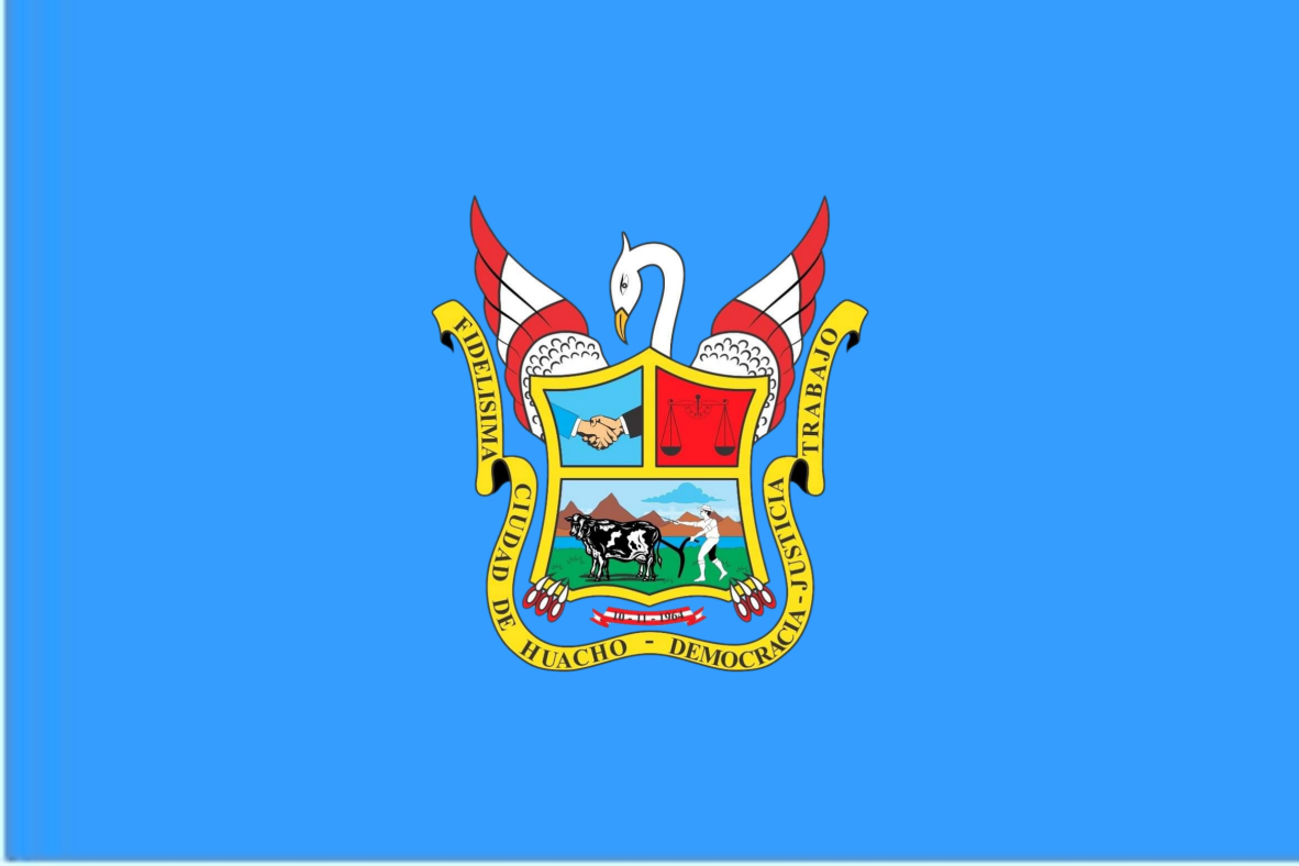 Bandera de Huacho